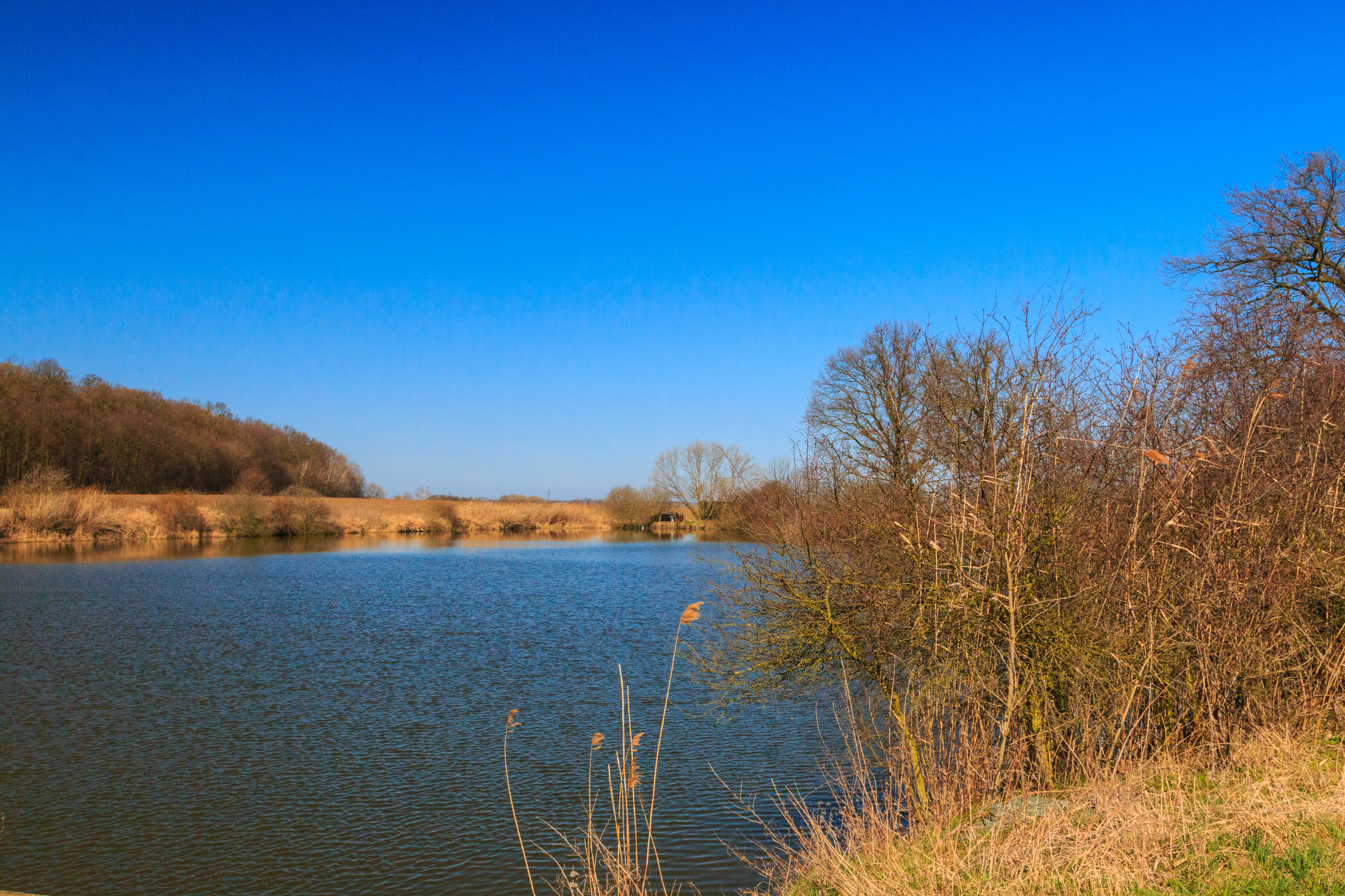 Podhájský rybník Project: Vodstvo